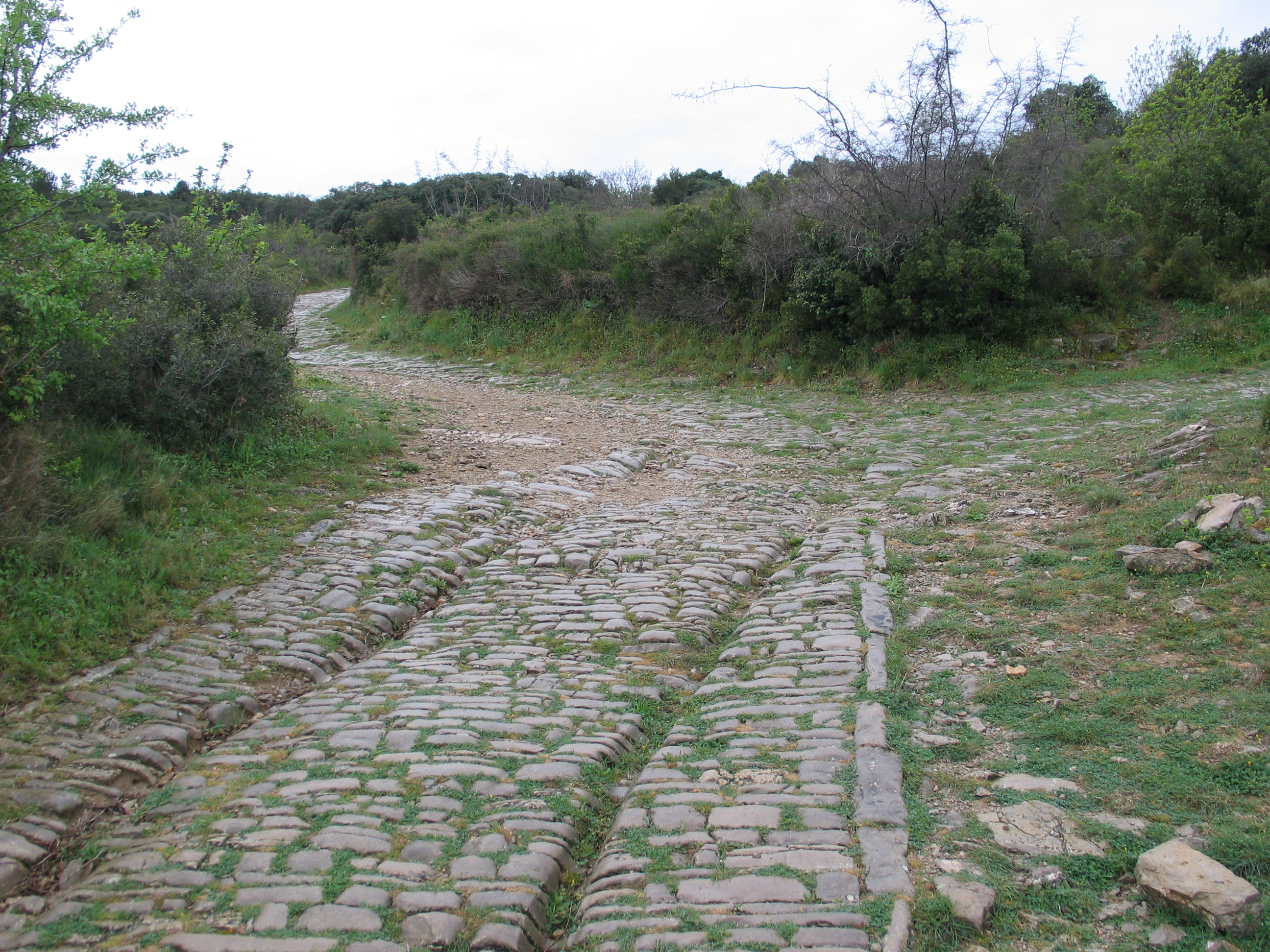 Ambrussum voies marquées à proximité de la porte est.